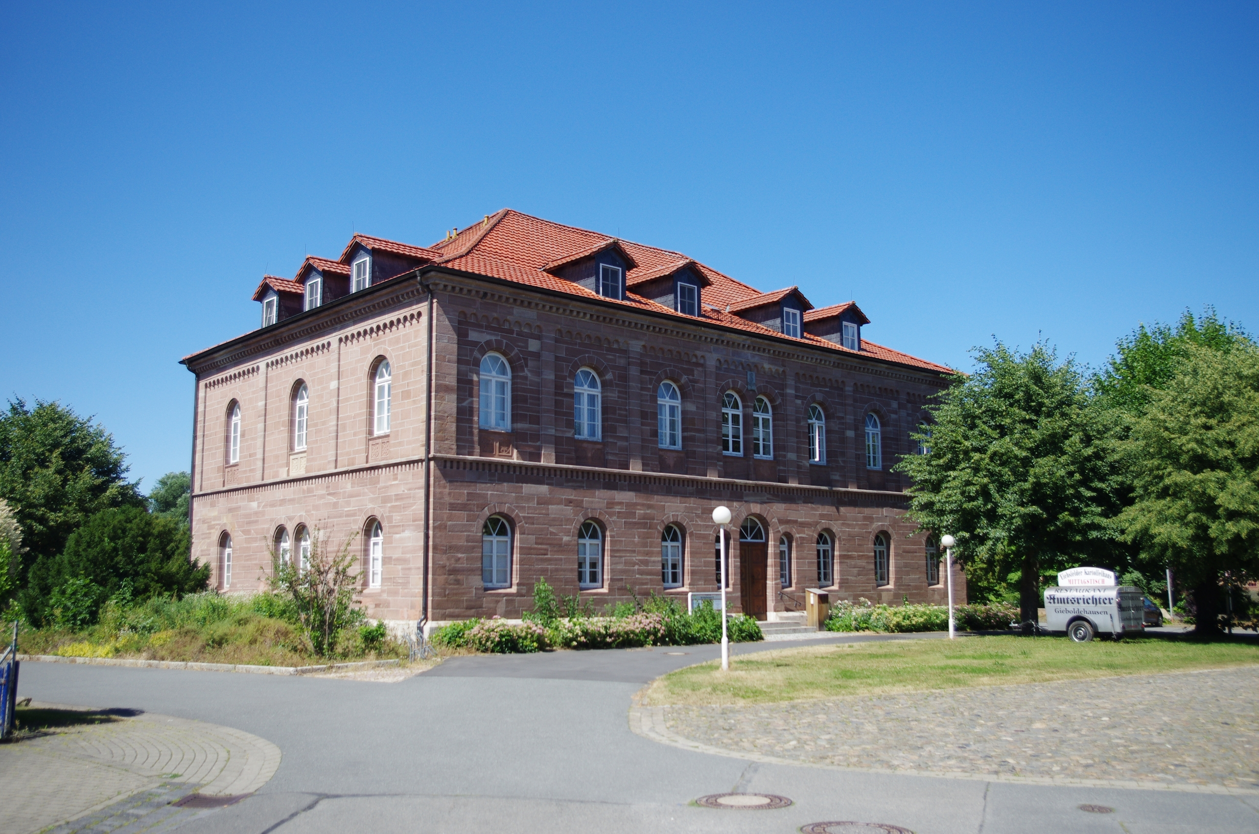 Gieboldehausen in Niedersachsen. Das Haus Amtstraße 8 steht unter Denkmalschutz (ehemaliges Amtsgericht).